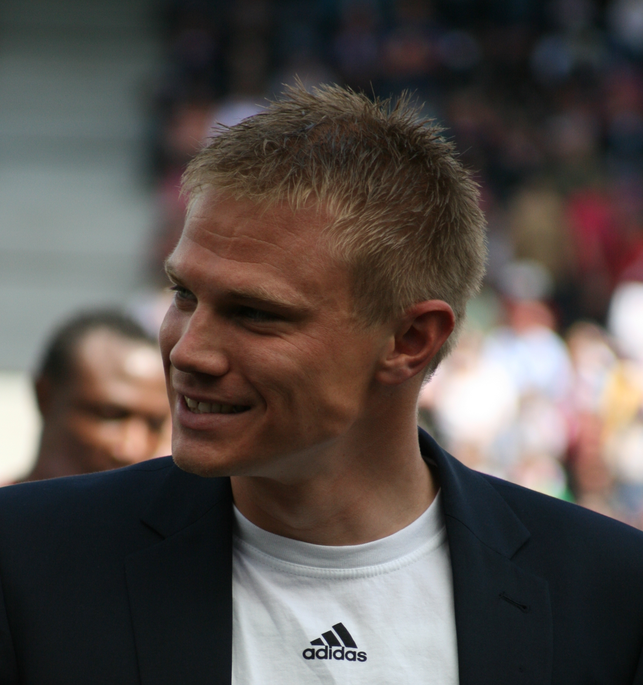 Timo Ochs